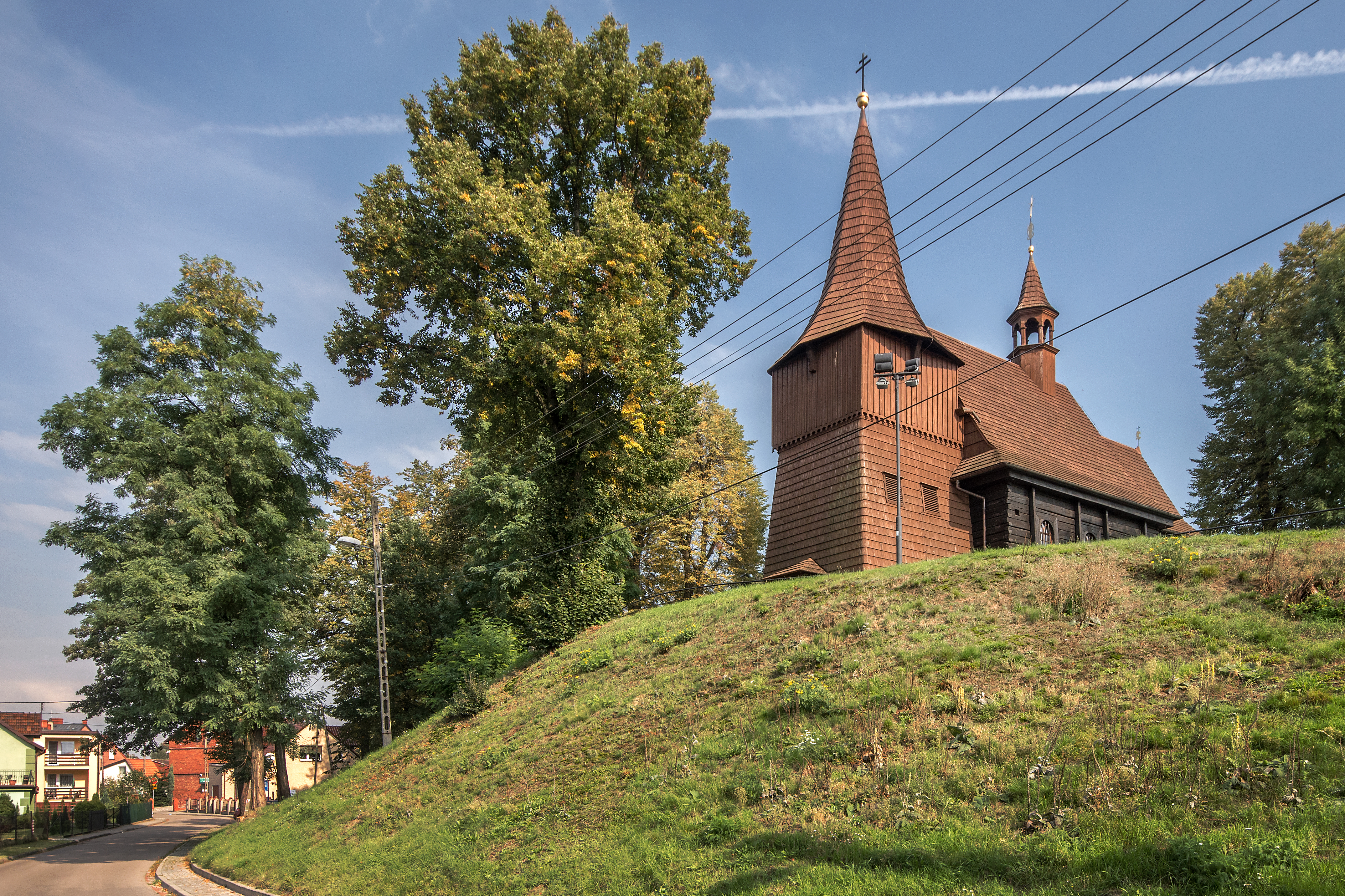 Żernica, Kościół św. Michała Archanioła w Żernicy